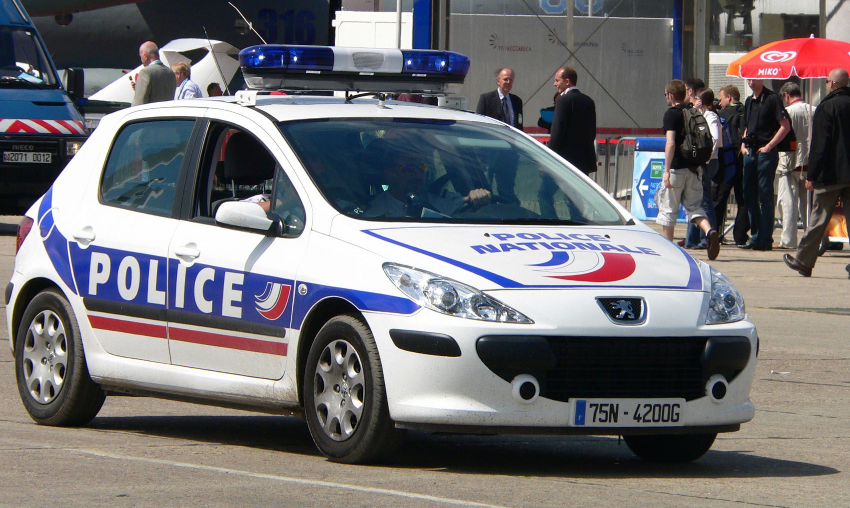 Ce véhicule est un véhicule d’intérêt général prioritaire, lorsque qu'il fait usage de ces avertisseurs sonores et lumineux